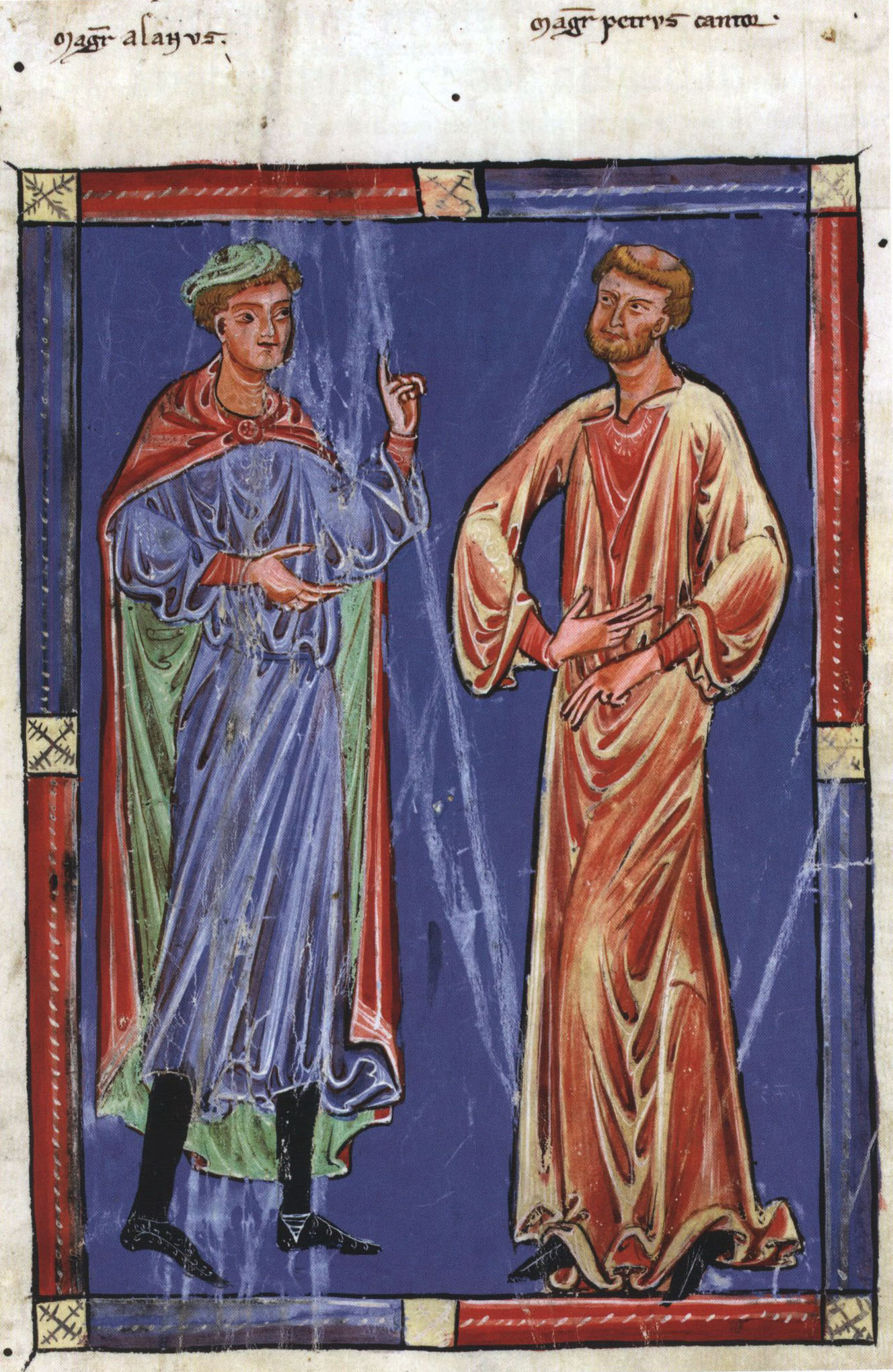 Die Miniatur zeigt die beiden Theologen und Lehrer Alain de Lille und Petrus Cantor während einer Debatte. Ganzseitige Miniatur in einem theologischen Sammelband, der zwischen 1227 und 1249 für den Abt der Benediktinerabtei Ottobeuren entstand (London, The British Library, Add. 19767, fol. 217).